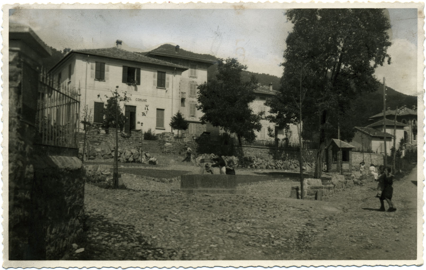 Anonimo, Esino - Piazza comunale, Esino Lario, XX sec., stampa bn, gelatina bromuro d'argento. 10x15, Courtesy Archivio Pietro Pensa CC-BY-SA, APP_VD_F_005. cartolina - sul retro:Esino Lario (900 s.m)/ la piazza Comunale/ ed. "Pro-Esino"